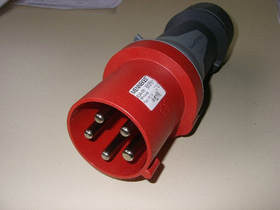 CEE stekker 63A 5polig